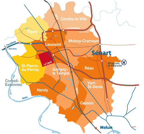 Commune de la ville nouvelle de Sénart